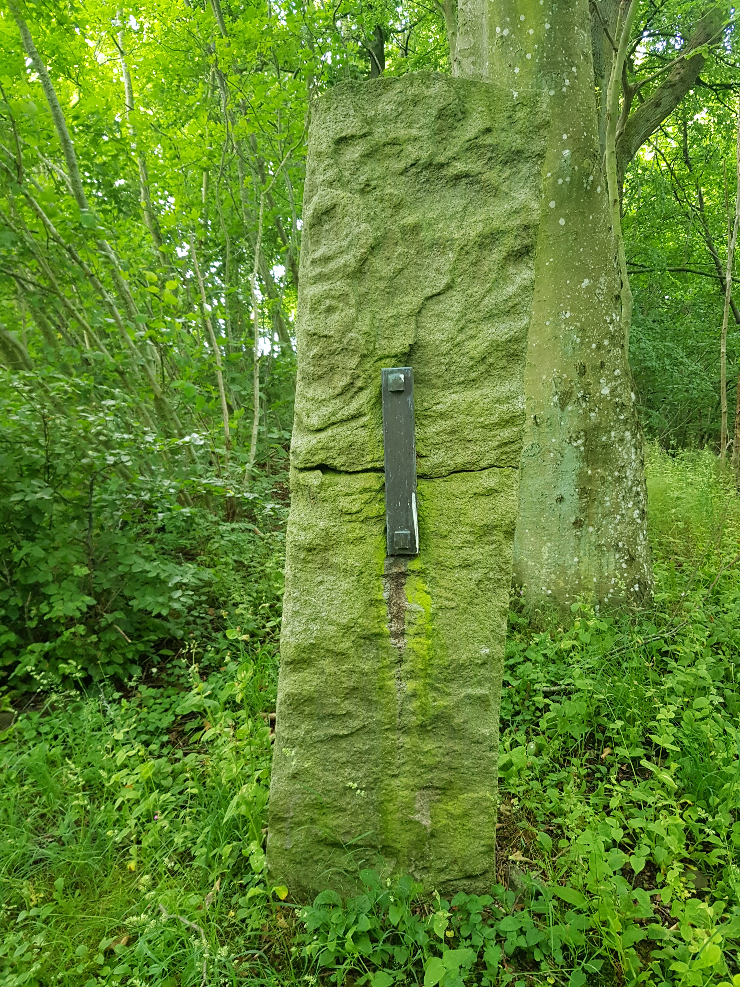 Brohusstenen (Runenstein), nördliche breite Seite, Standort: in einem kleinen Hain am Lyrsbyvej am Gyldenså bei Brohuse, Bornholm. Auch unter dem Namen "Østermarie-Stein 4" bekannt.